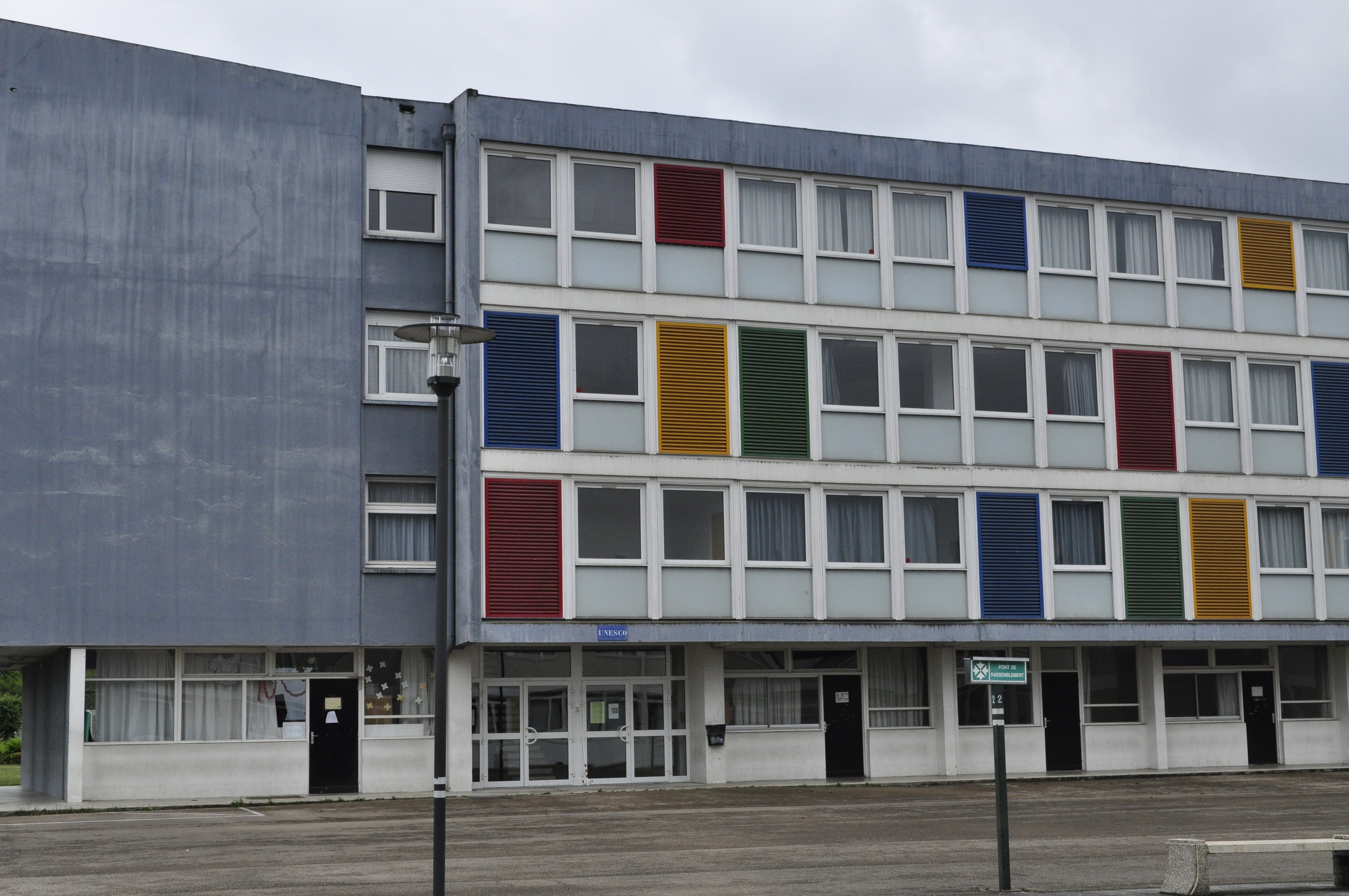 Cité scolaire François Ier de Vitry-le-François (51300) : bâtiment Unesco.